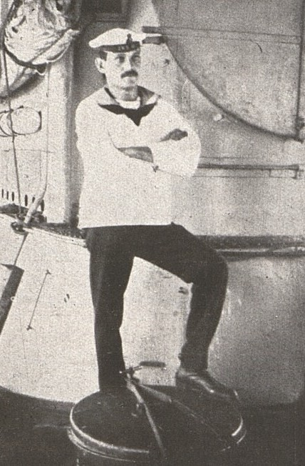 František Koucký, český námořník, popraven 1918